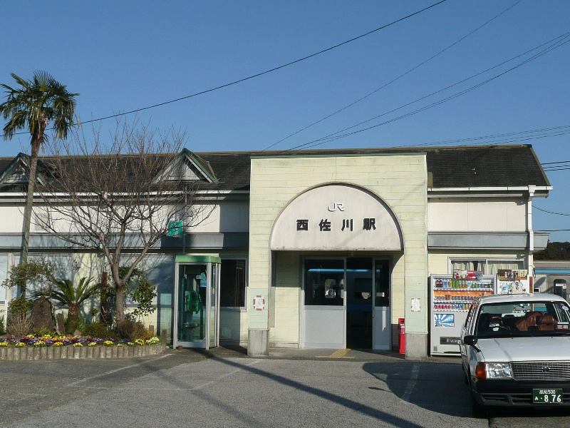 Nishi-Sakawa station